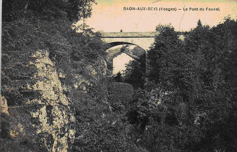 Carte postale ancienne du Pont du Fouxel à Raon aux Bois